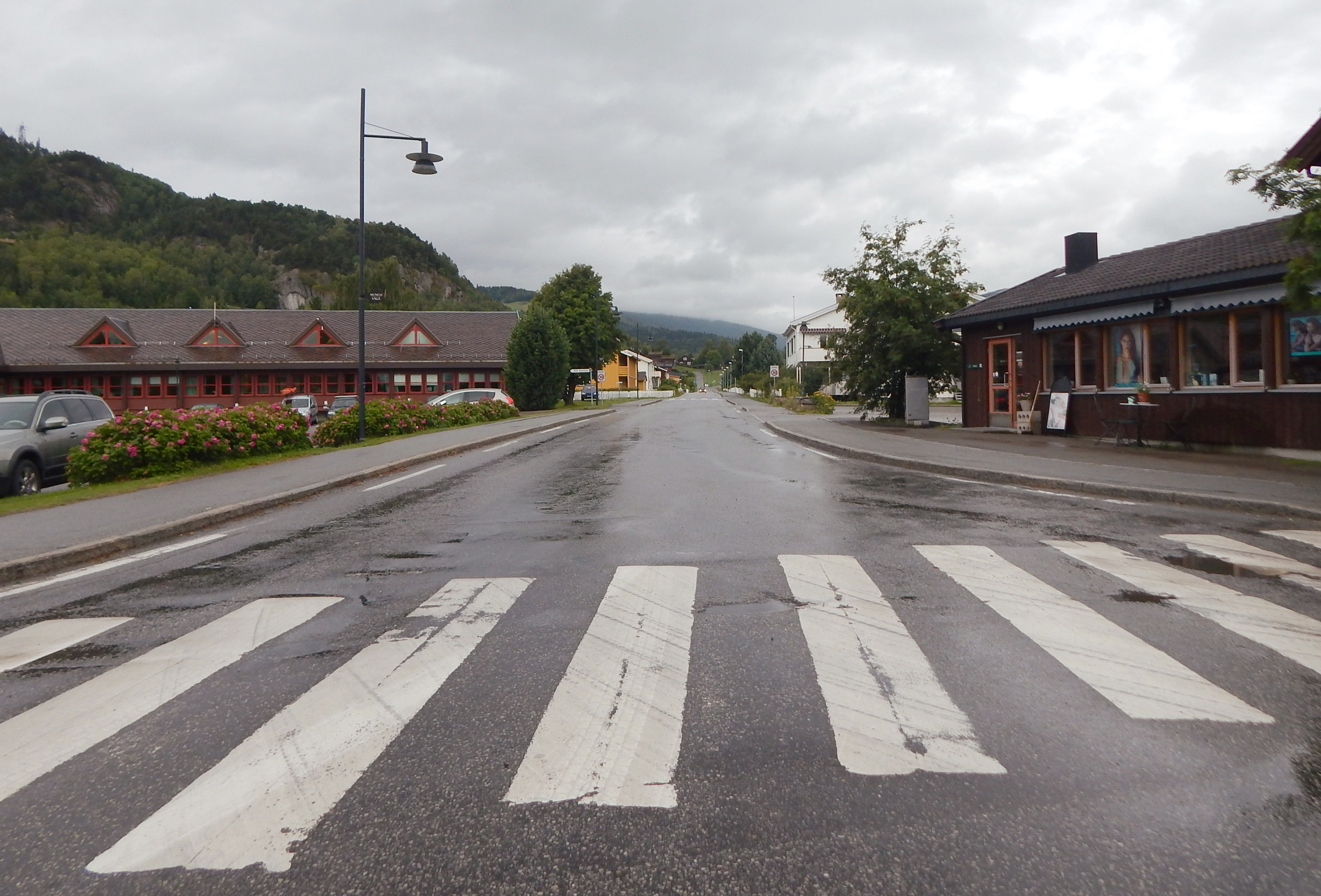 Fylkesvei 454 i Vågåmo